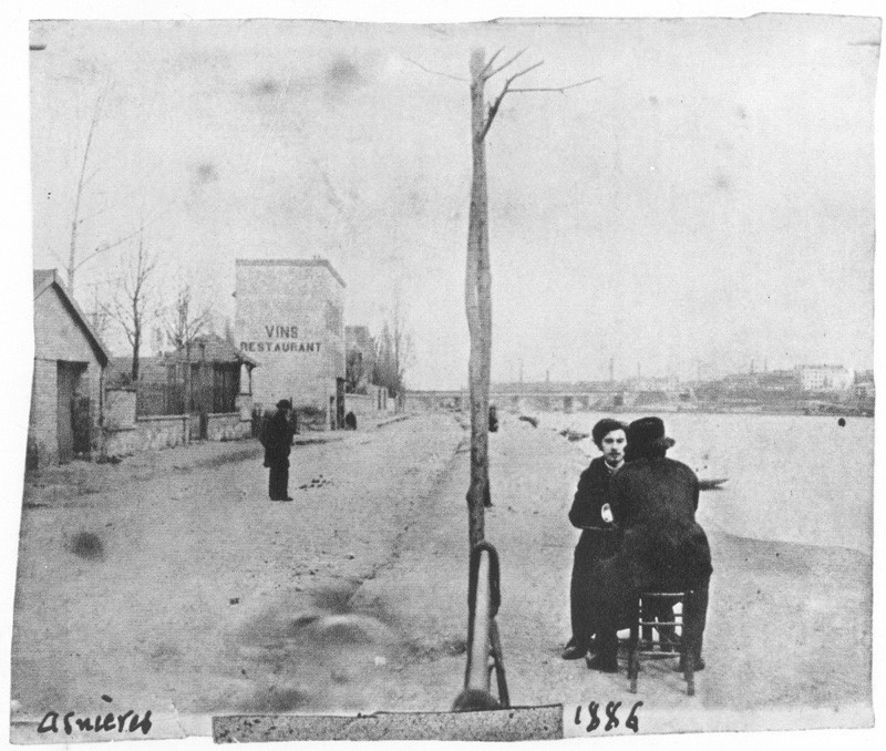 BERNARD Emile and Vincent VAN GOGH (back to the camera) on the banks of the Seine at Asnieres, 1886